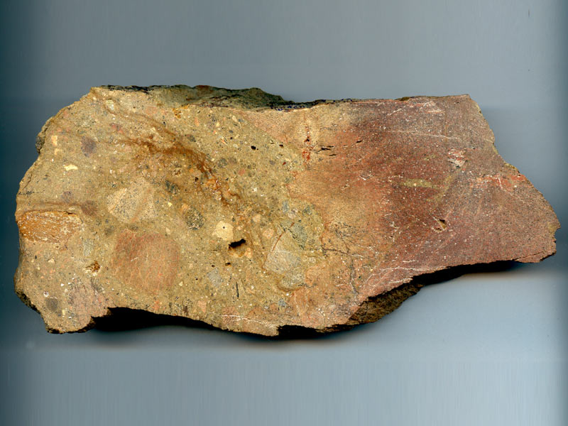 Fragment de brèche d'impactite du cratère d'impact de Rochechouart (France). Brèche de Rochechouart La ville de Rochechouart donne son nom au cratère de l'impact qui a eu lieu il y a 214 millions d'années. Ce fragment montre des fragments de gneiss, de granite, de quartz, et de leptinite liés entre eux par une matrice clastique, composée de poussières qui se sont solidifiées dans le temps.